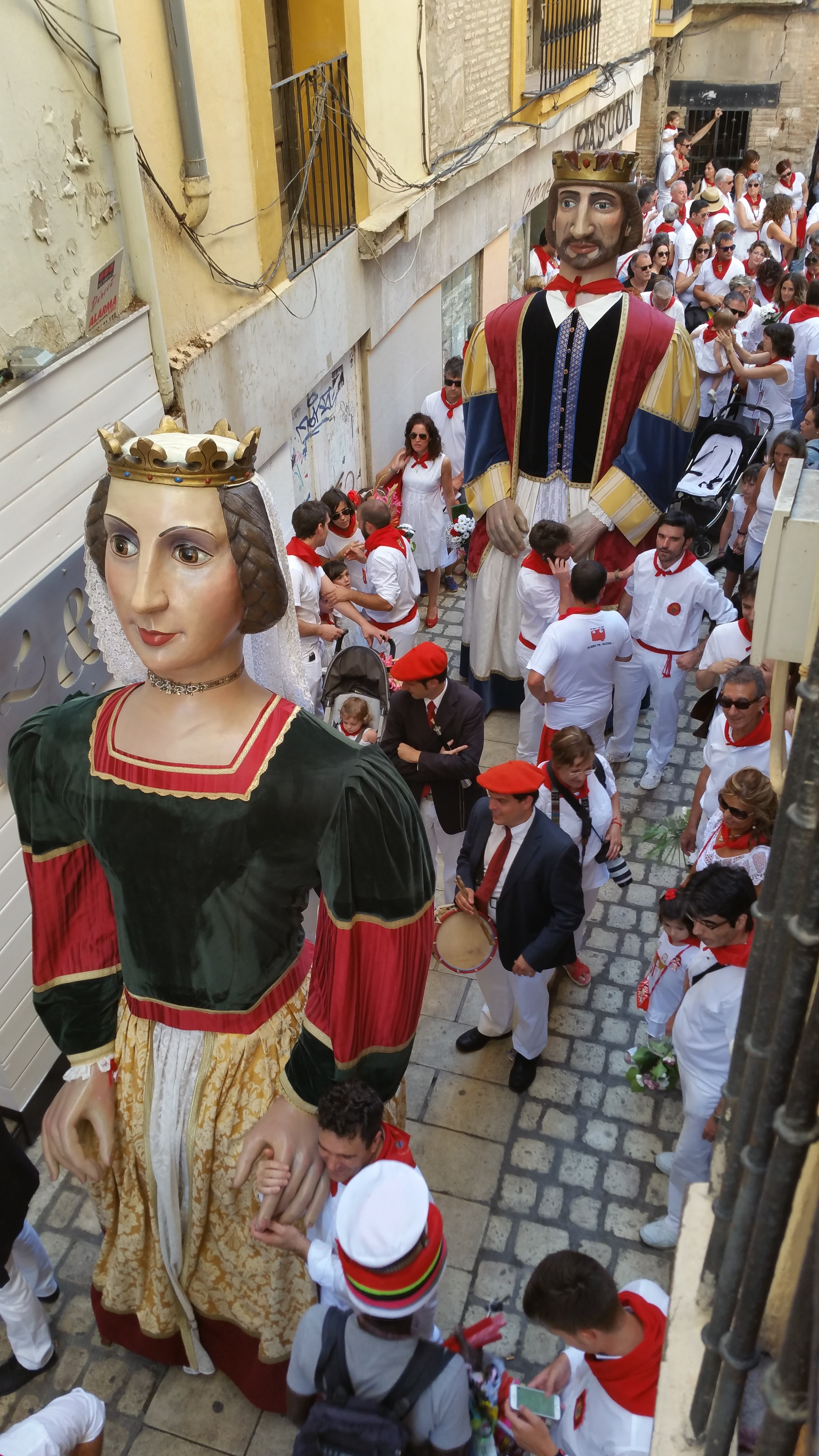 Fiestas de Santa Ana This is a photography of a Folklore festival in Spain (Wikidata id Q17632299).